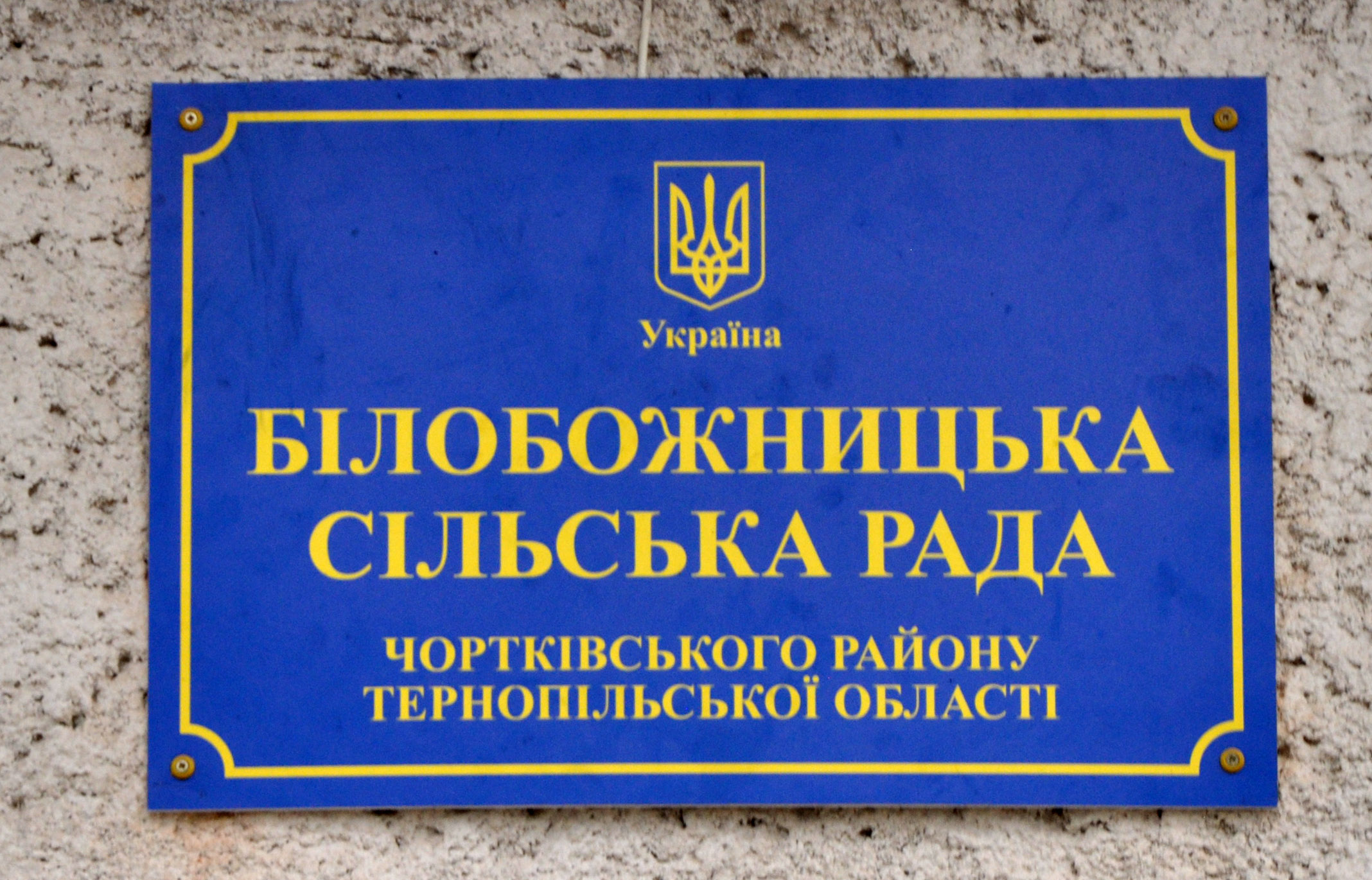 Вивіска Білобожницької сільської ради Чортківського району Тернопільської області України.